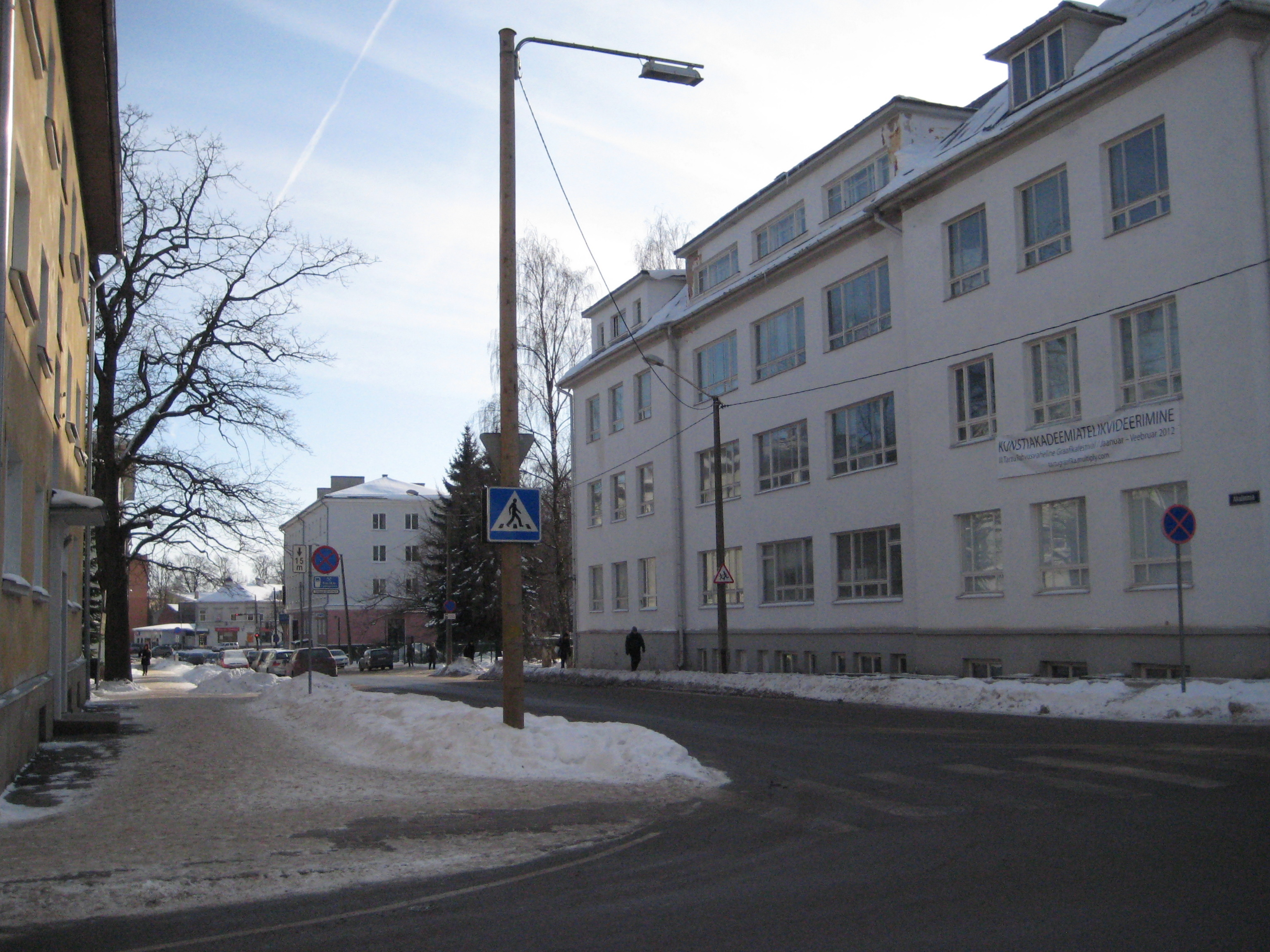 Akadeemia tänav Vanemuise ristmikult Riia tänava poole, Tartu